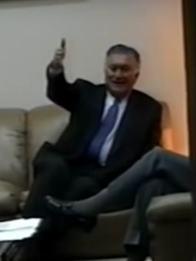 Genaro con Vladimiro.